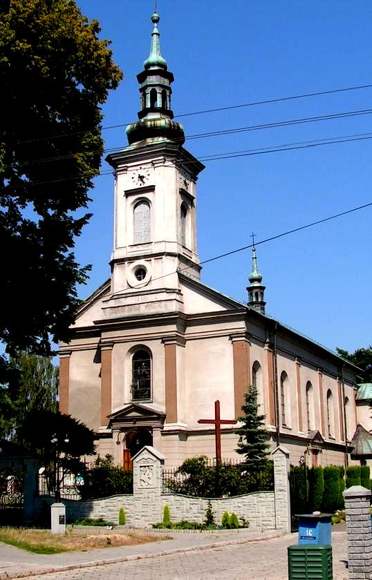 Kościół pw. św. Urbana w Brzeszczach, wybudowany w stylu neobarokowym.